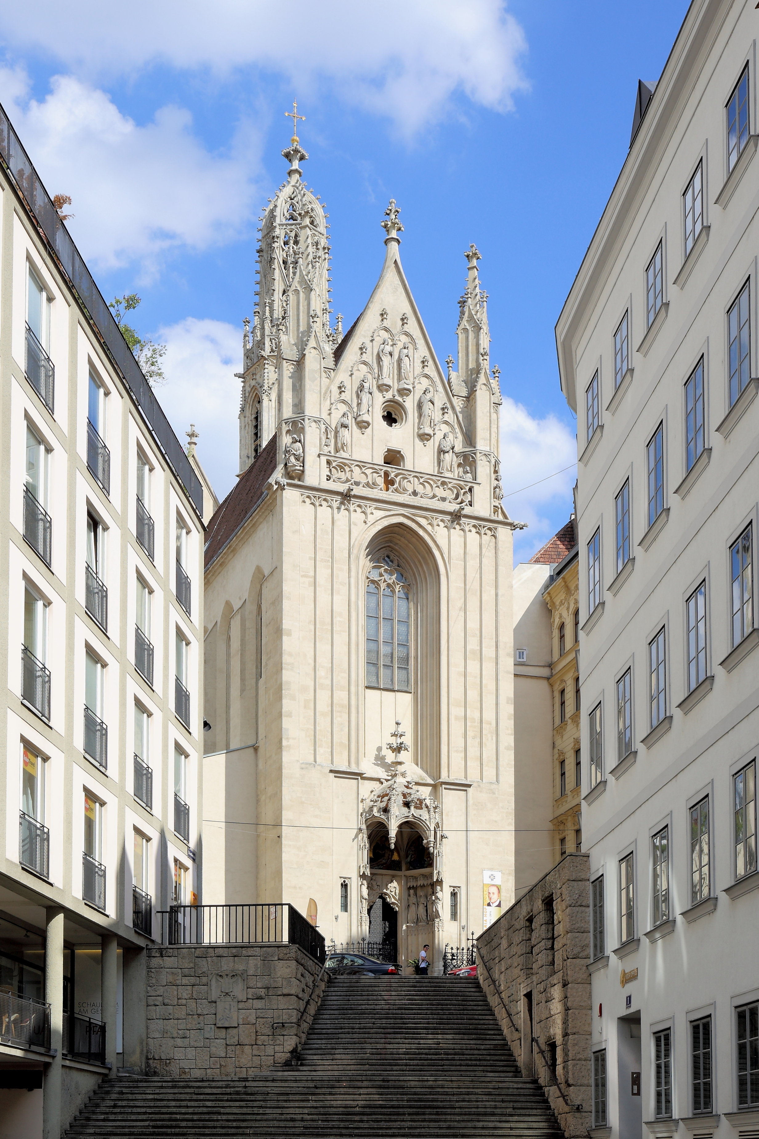 Westansicht der Kirche Maria am Gestade im 1. Wiener Gemeindebezirk Innere Stadt.Der Chor wurde im 14. Jahrhundert errichtet, das Langhaus im 15. Jahrhundert. Der charakteristische durchbrochene Turmhelm entstand von 1419 bis 1428. Die gotische Kirche wird seit 1812 vom Redemptoristenorden betreut. Im Jahr 1862, im Zuge des Seeligsprechungsprozesses, wurden die sterblichen Überreste des Heiligen und Patron von Wien Klemens Maria Hofbauer hierher überführt.